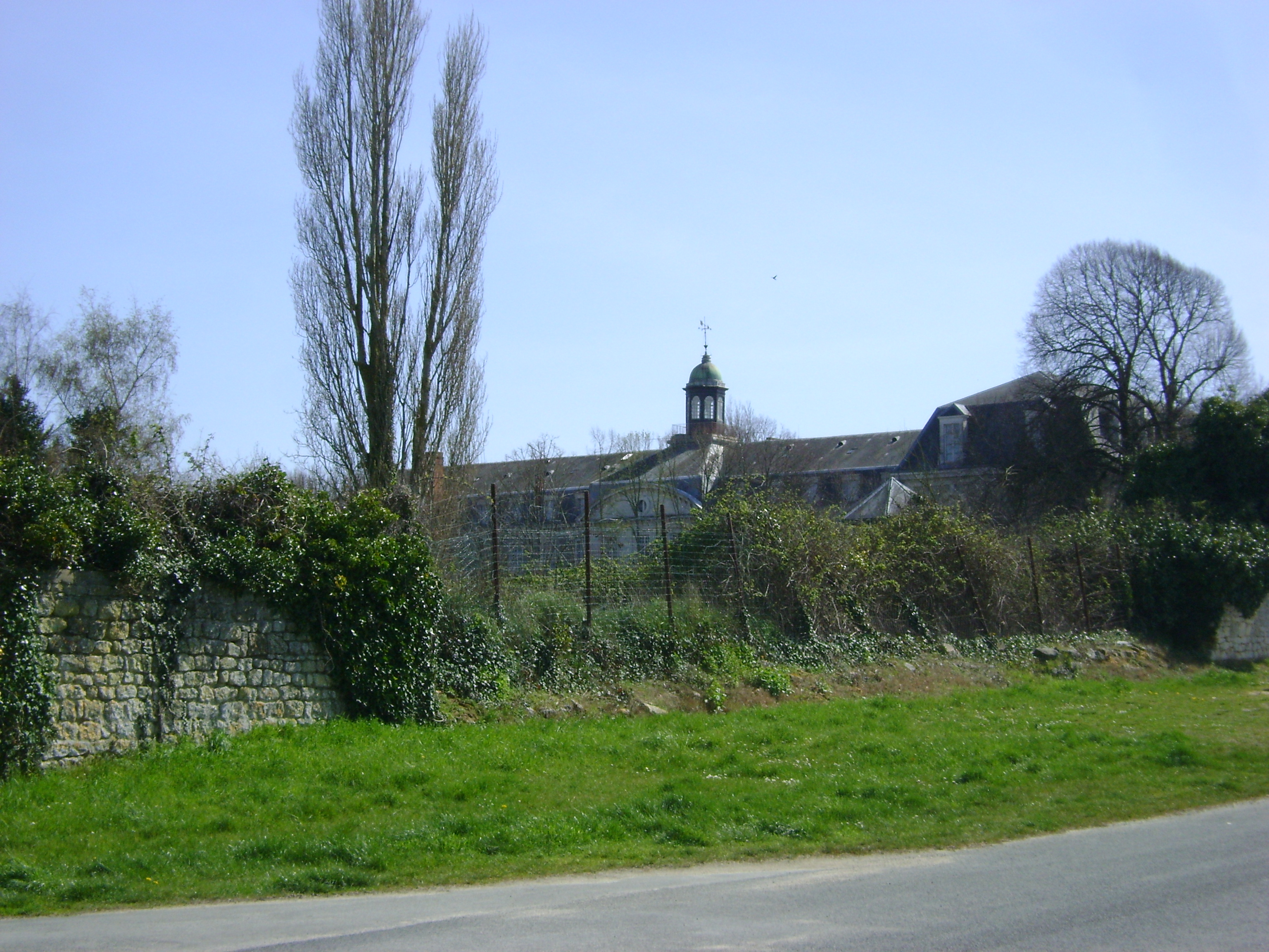 Aperçu du coté nord de l'Hôpital maritime de Rochefort, Charente-Maritime. .